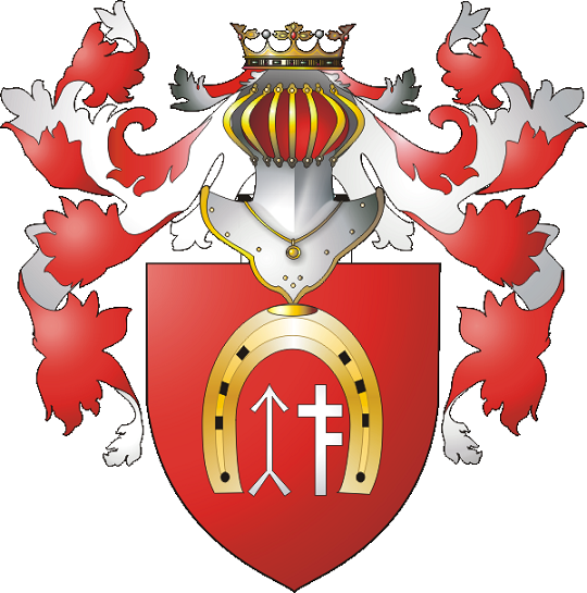 Jacyna, polish CoA